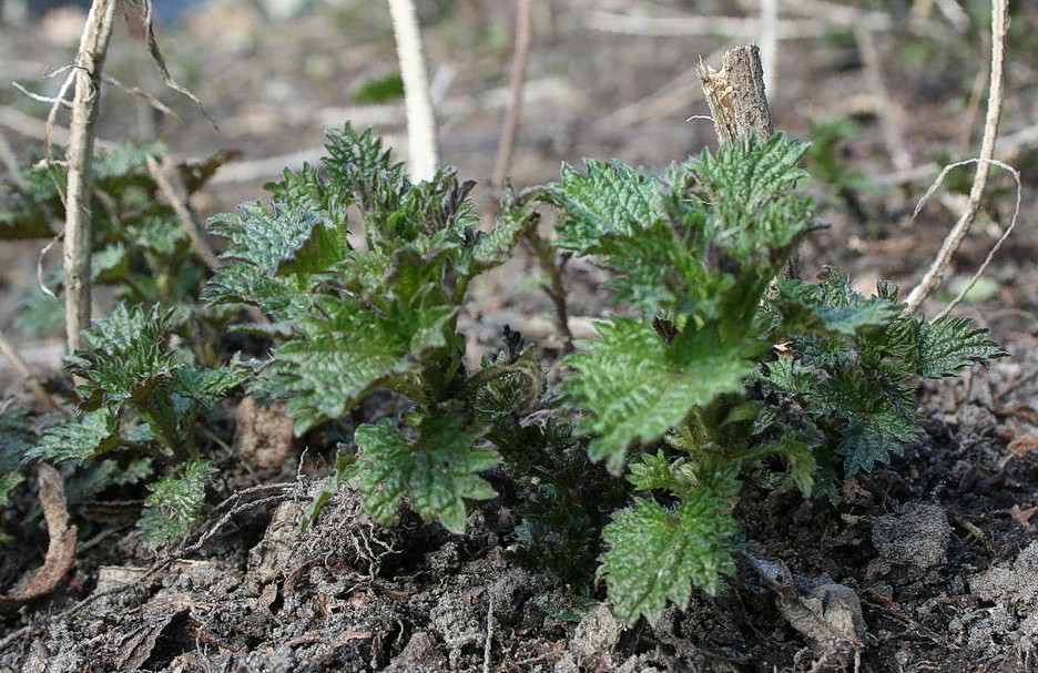 Drei junge Brennnesseln. Ungefähr 15 Tage alt. In diesem Stadium sehr lecker und würzig; zum einfach so essen oder auch im Salat und im/als "Spinat". Aufgenommen auf dem Gartengrundstück der ökoscouts in Braunschweig, Kreuzstr. 62